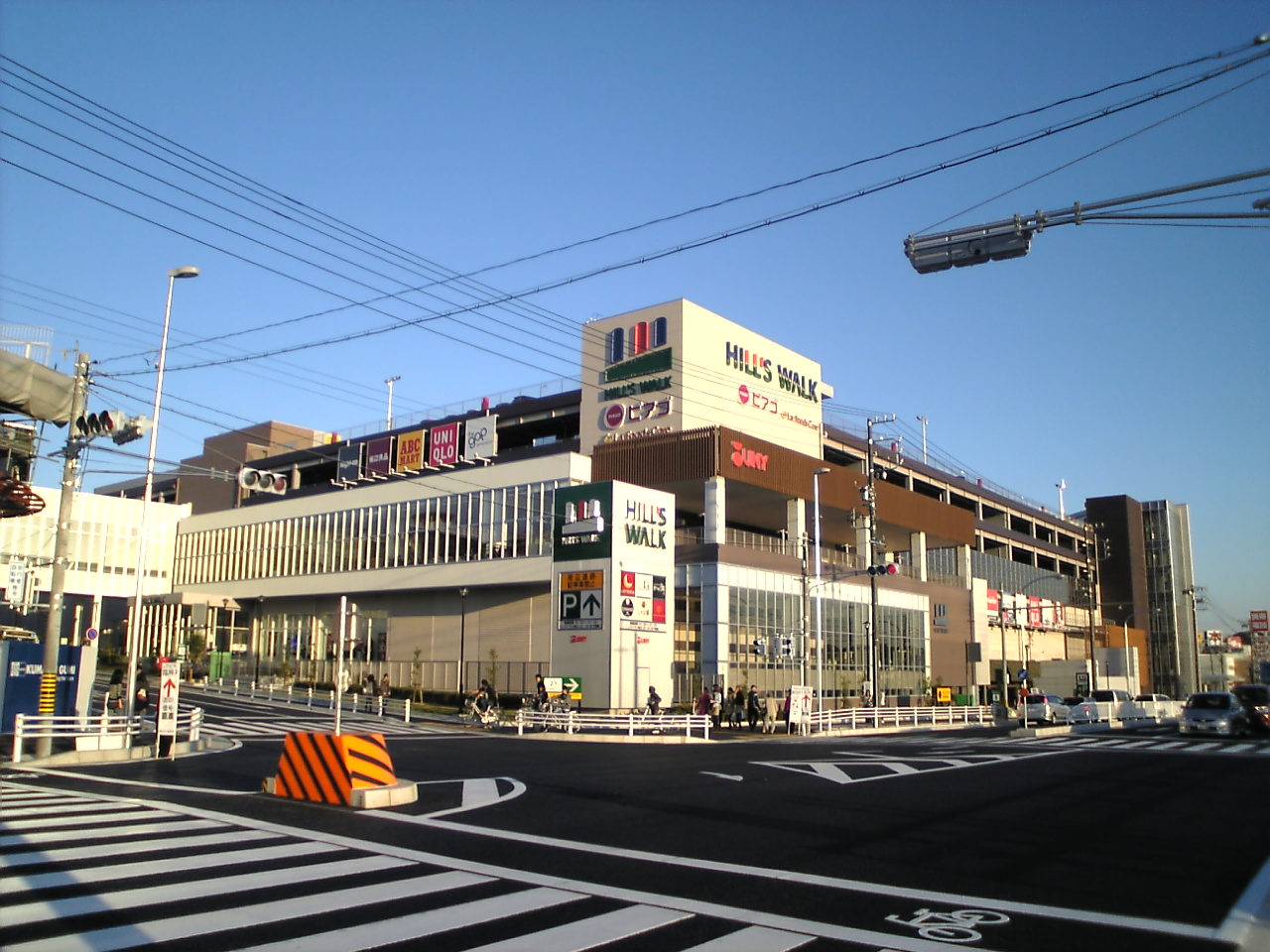 ヒルズウォーク徳重ガーデンズ外観